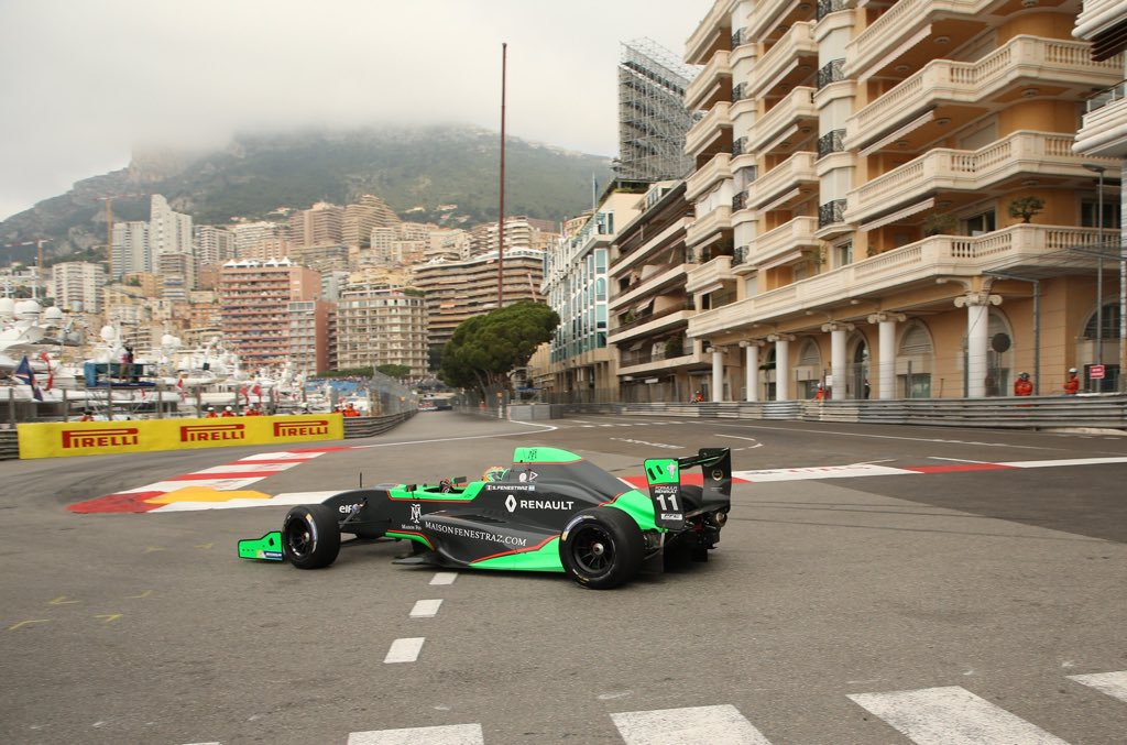 Photographie de Sacha Fenestraz en Eurocup Formula Renault 2.0 en 2017 avec l'équipe Josef Kaufmann Racing à la Nouvelle Chicane sur le circuit de Monaco.